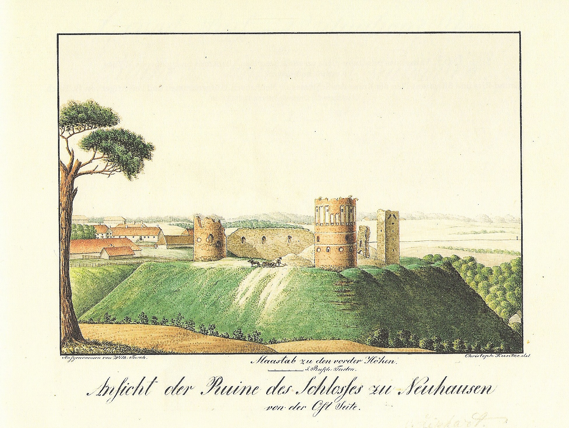 Vastseliina linnuse varemed. Paulucci album